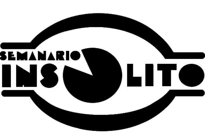 Logotipo re-editado (del original) de Semanario insólito, programa de televisión argentino de 1982-83.